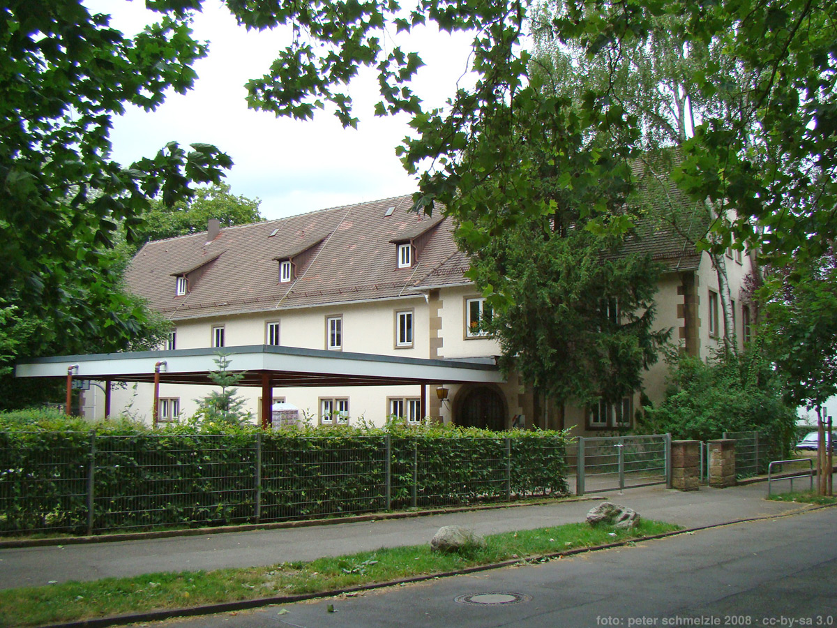 Neckartalschule (ehem. Wilhelm-Hofmann-Schule) in Heilbronn-Böckingen